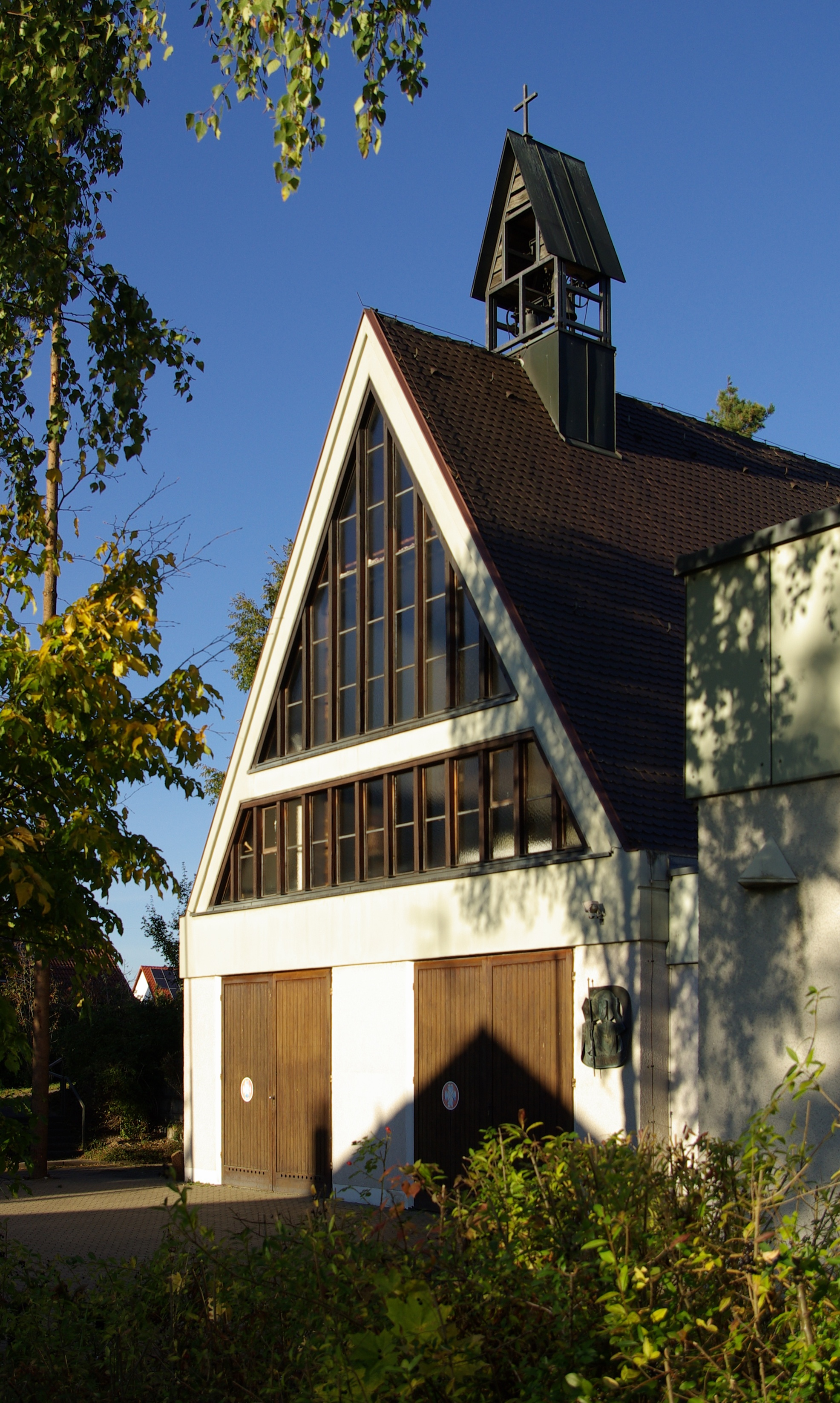 Kapelle St. Michael mit Feuerwehrschuppen in Steudach (Erlangen)